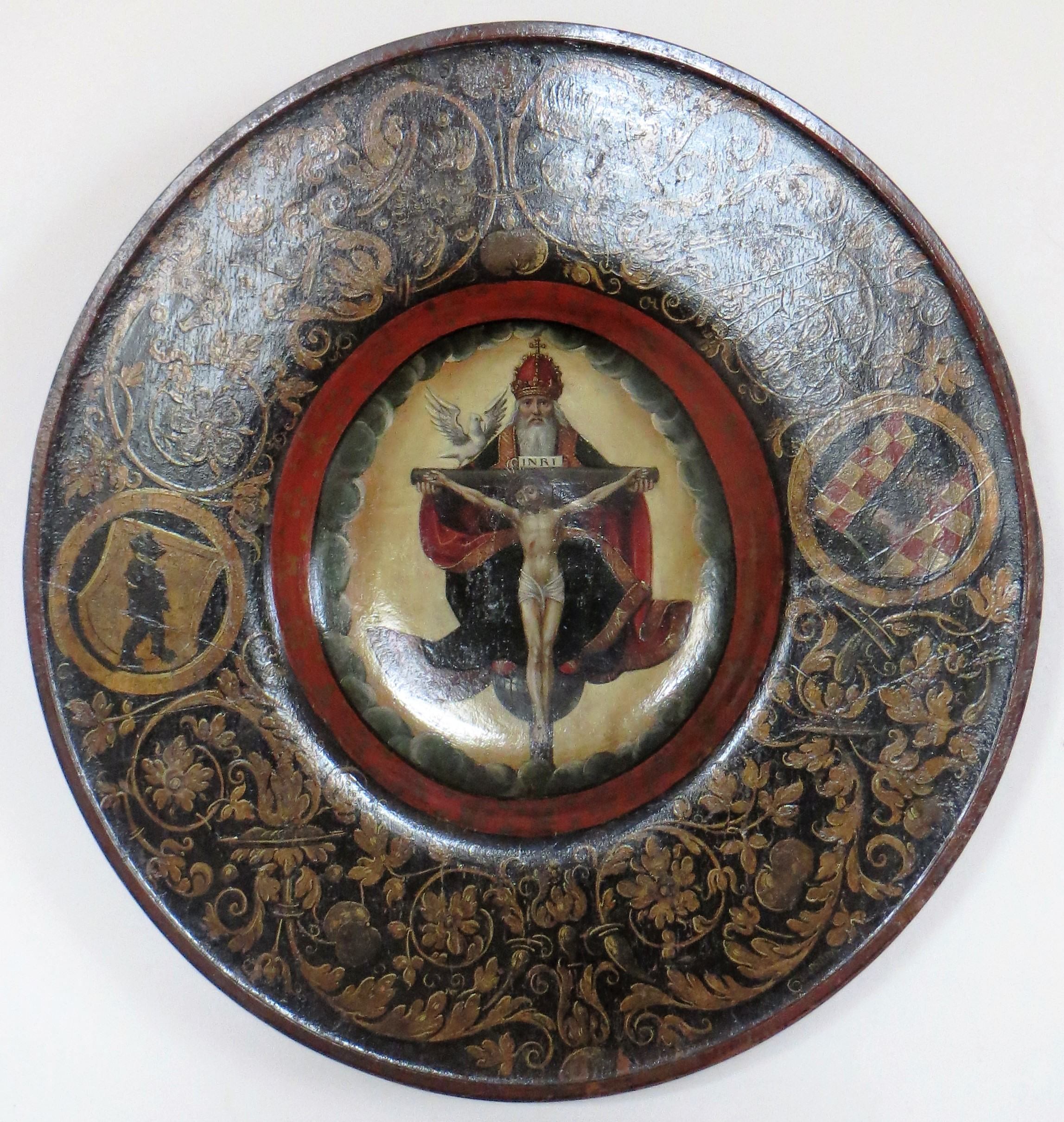 Hans Kemmer: Brautschale/Hochzeitsschüssel (1540) für die Tochter von Casten Timmermann und Elisabeth, geb. Kruselmann mit ihren Wappen und Gnadenstuhl (Trinität); Schloss Güstrow Sign. G 2660